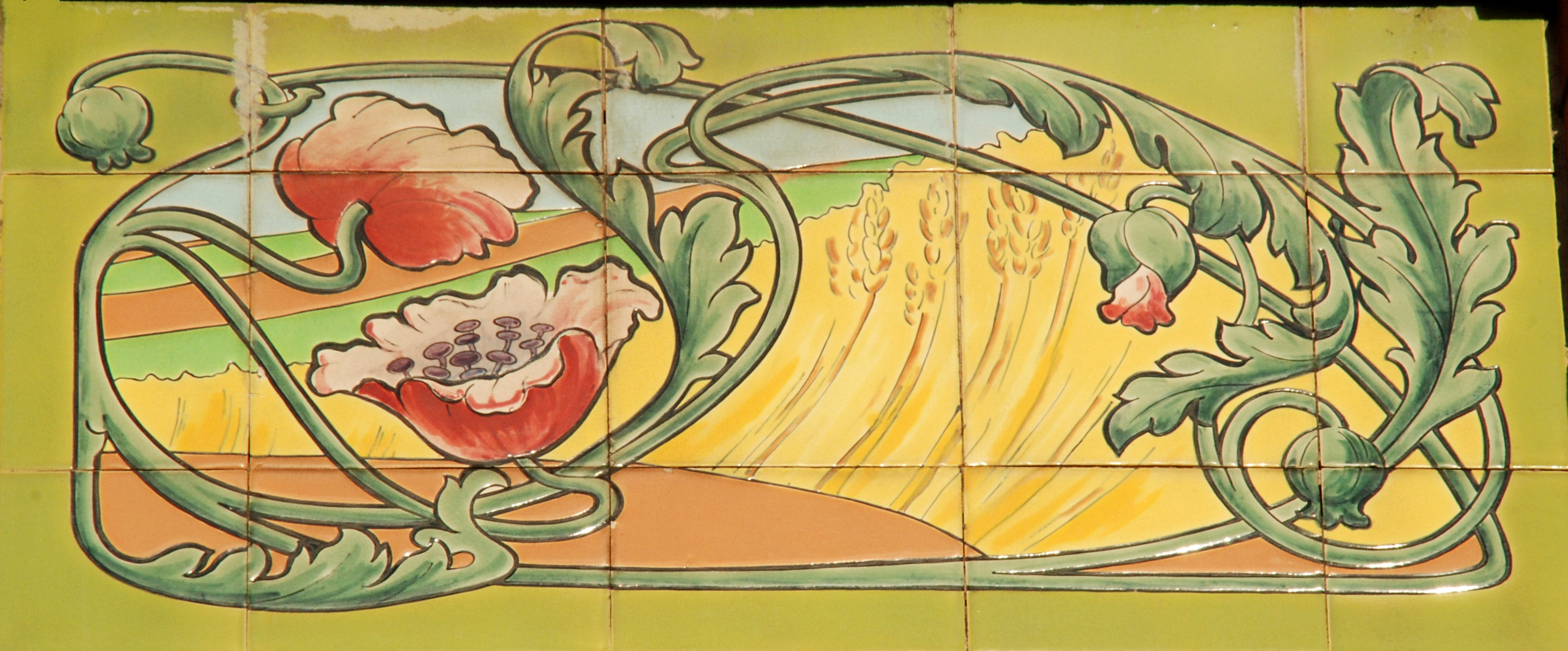 Gare de Genval (Art nouveau) : céramique à droite du balcon